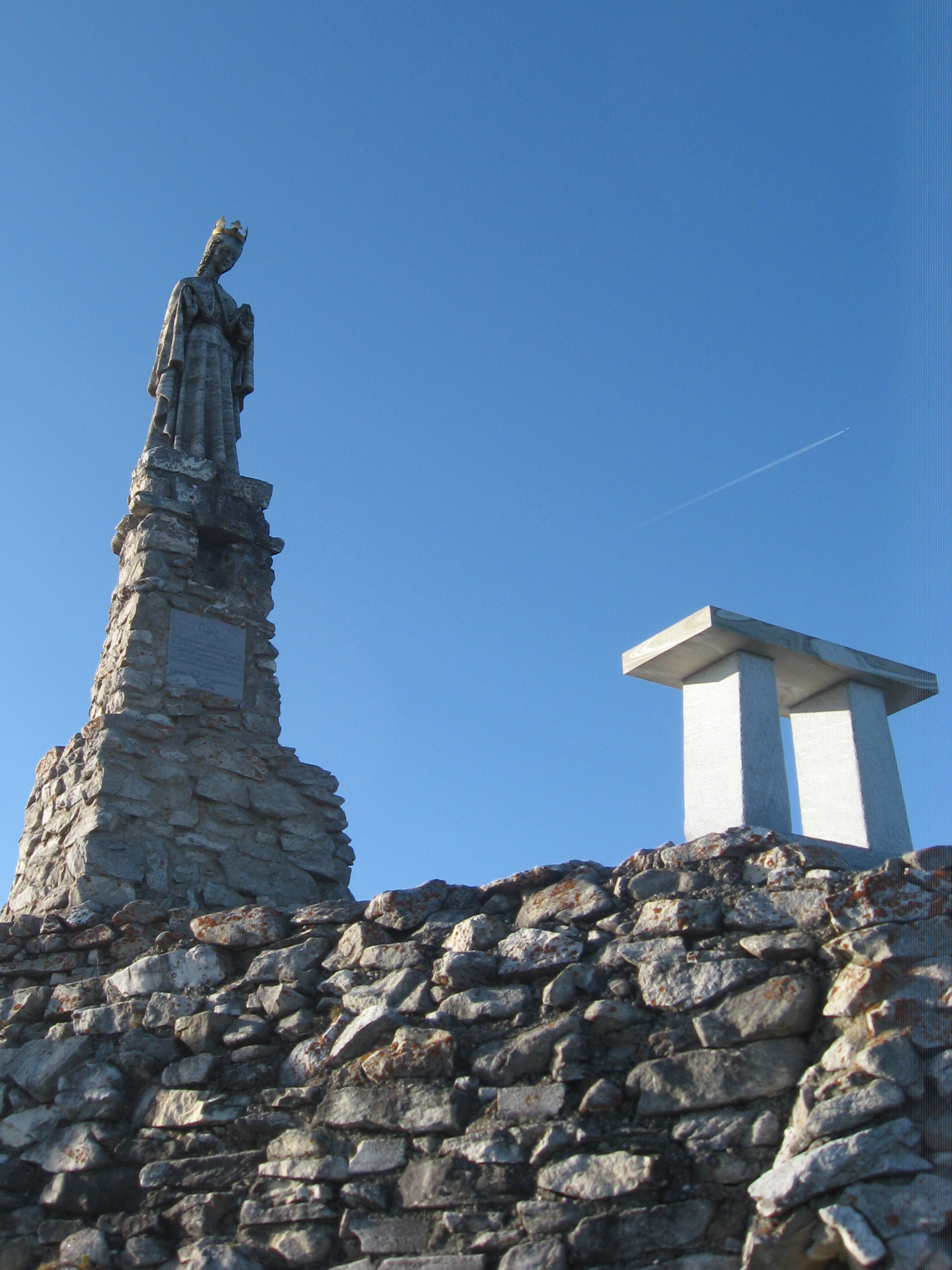 Madonnenstatue von Alfred Schlosser (1954) am Wölkerkogel, Stubalpe